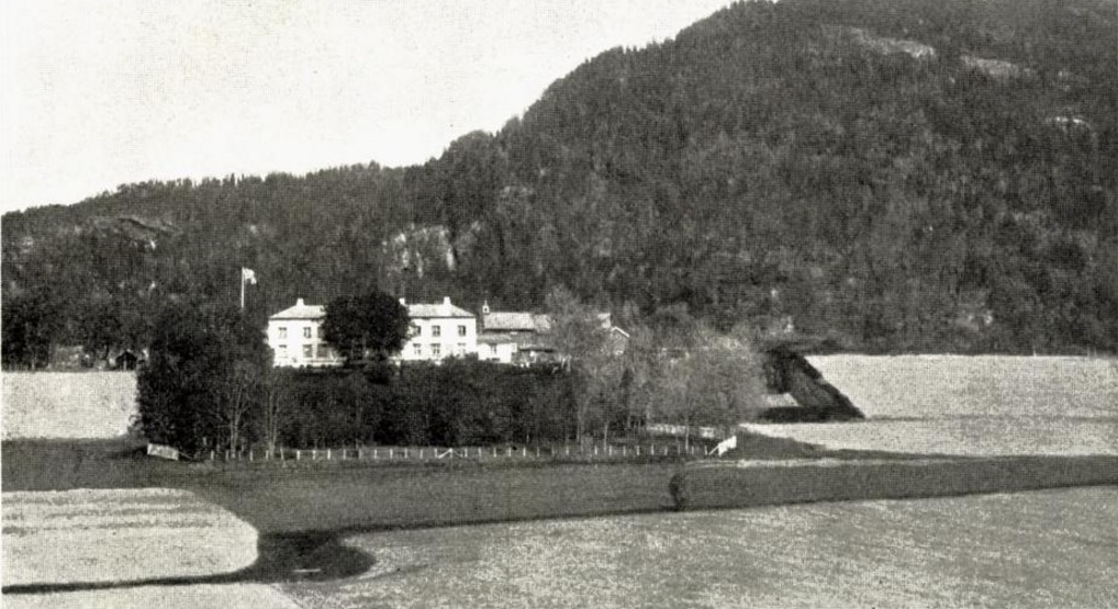 Gården Mæle i Stjørdal.